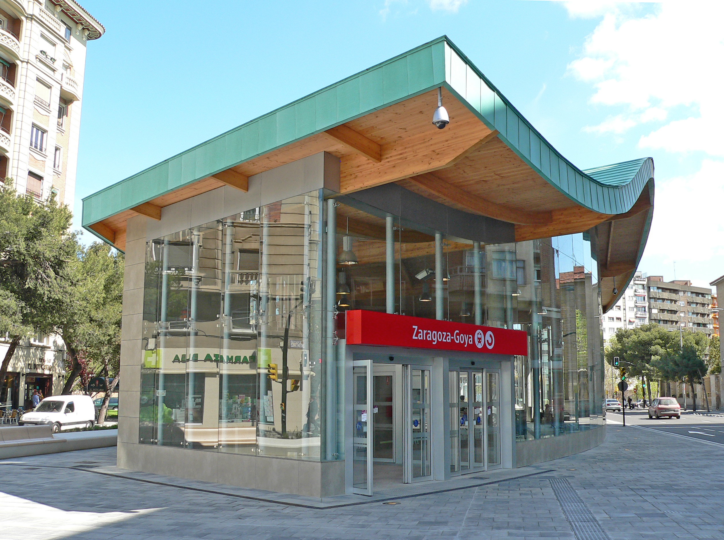 Estación Zaragoza-Goya de la línea C-1 de Cercanías de Zaragoza.